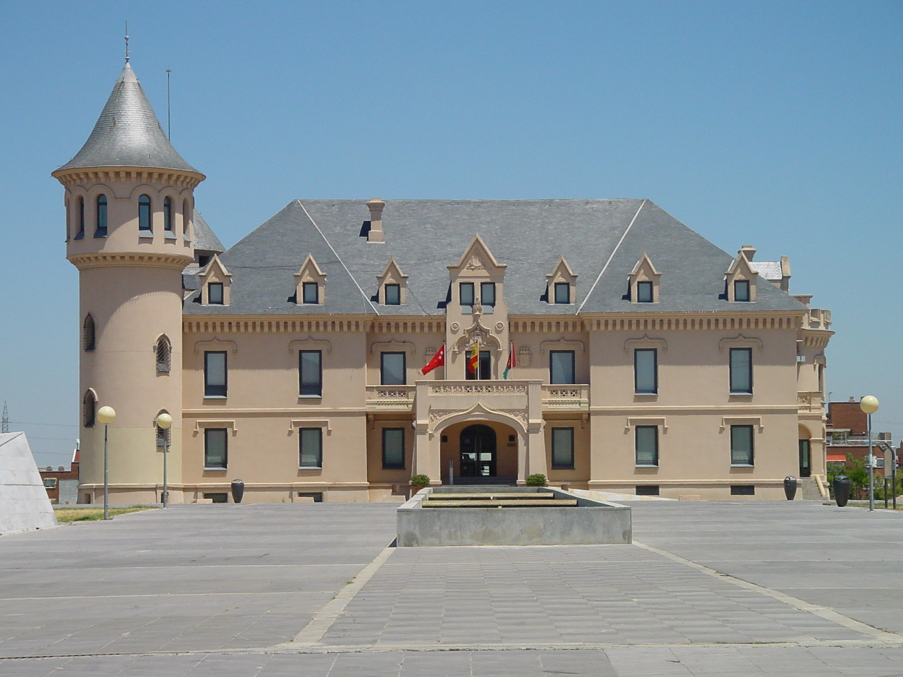 Museo de Arte en Vidrio de Alcorcón - MAVA, Alcorcón, Spain.